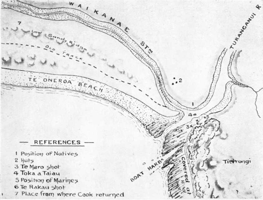 Mapa esquemático del lugar del primer desembarco de James Cook y sus hombres en Nueva Zelanda, octubre de 1769.